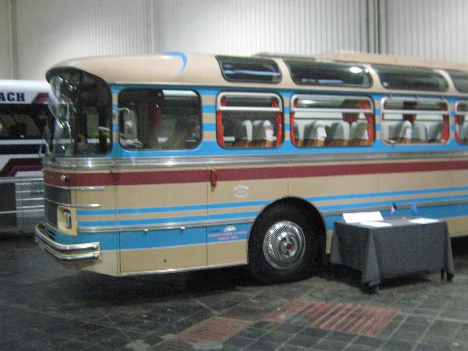 Internationale Automobilausstellung für Nutzfahrzeuge in Hannover 2010